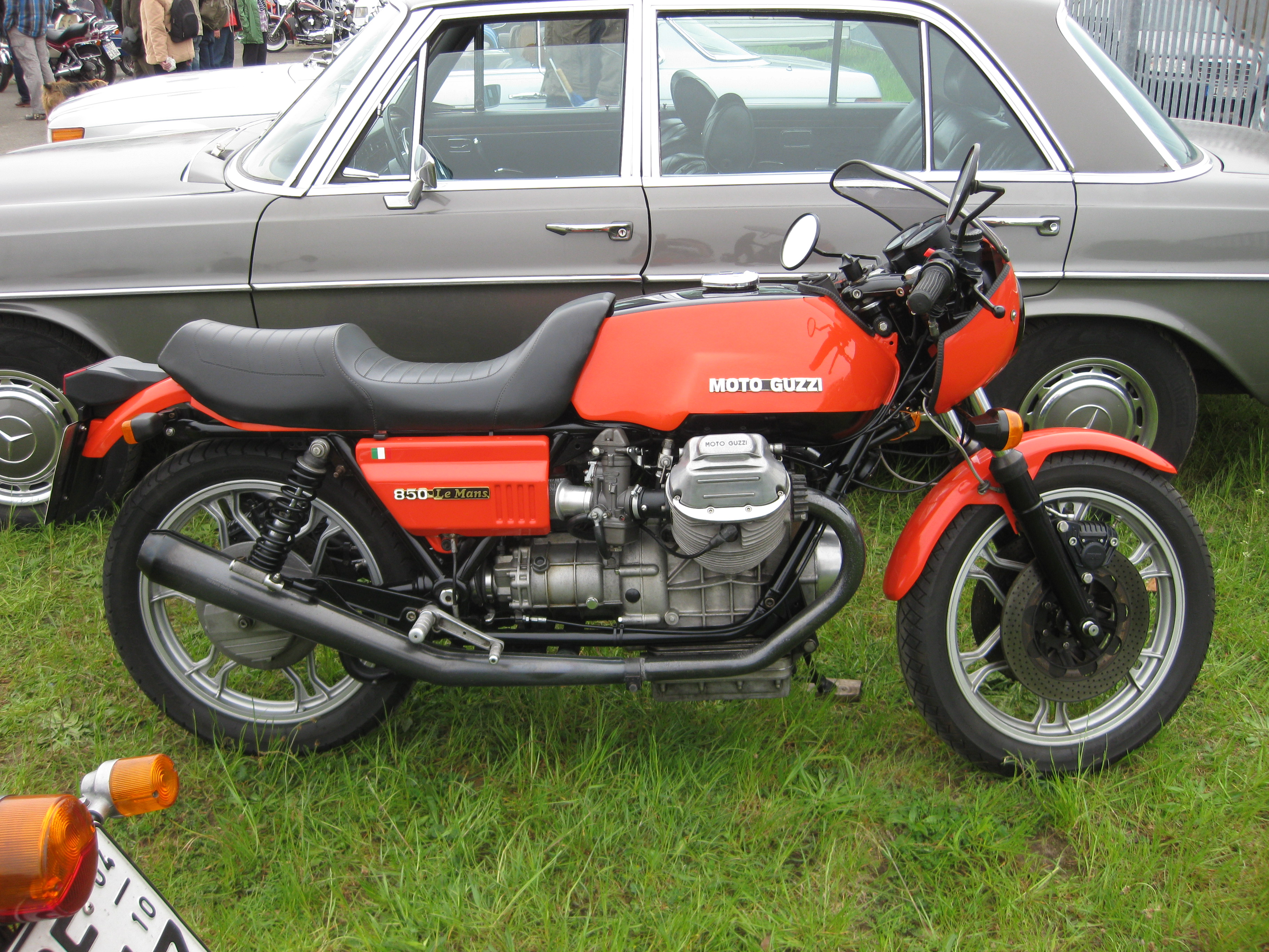 Moto Guzzi 850 LeMans